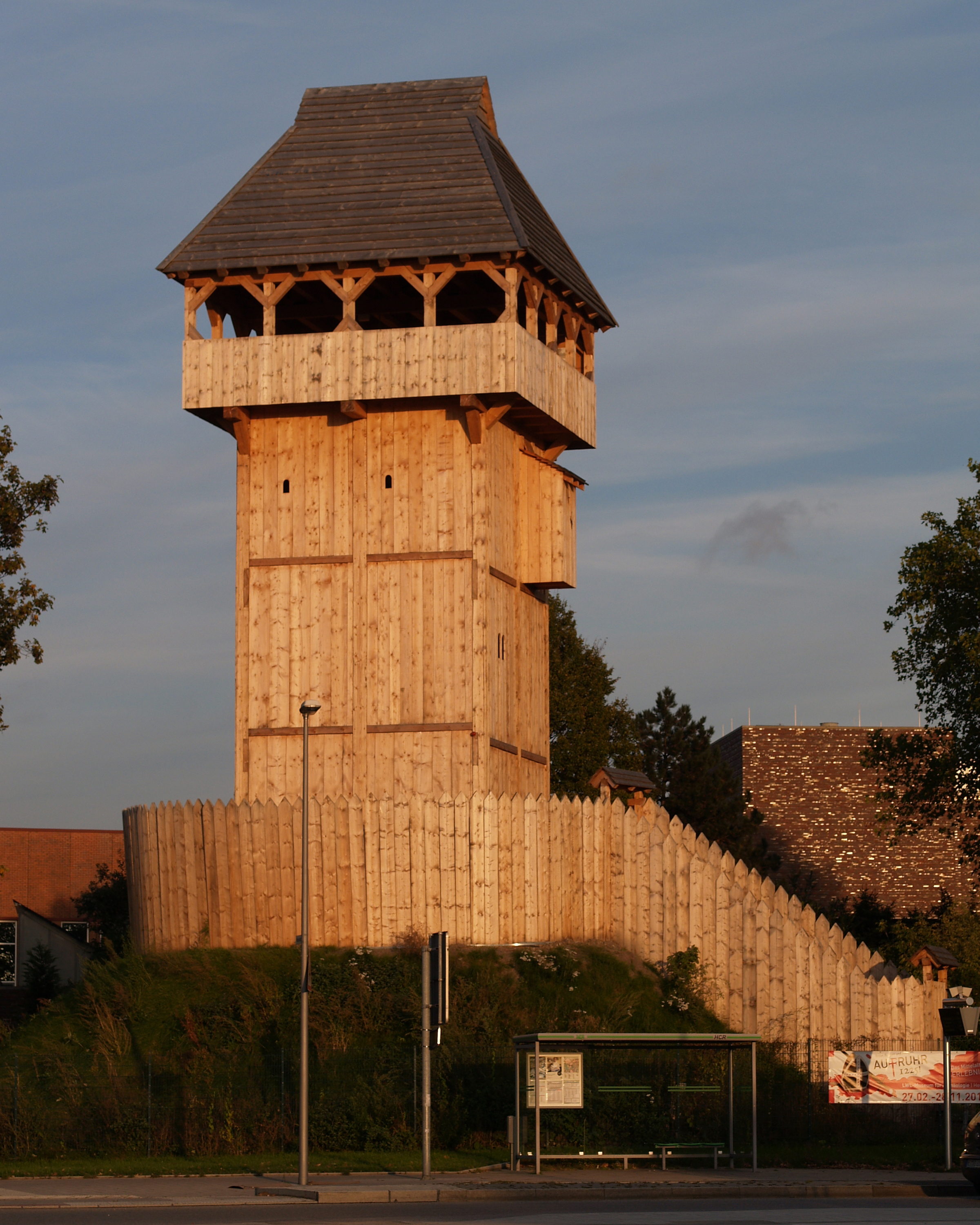 Beispiel einer Turmhügelburg (Motte) im Westfälischen Museum für Archäologie in Herne zur Ausstellung AufRuhr 1225!